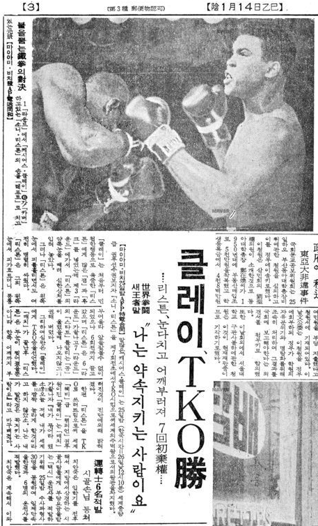 モハメド・アリ 京郷新聞